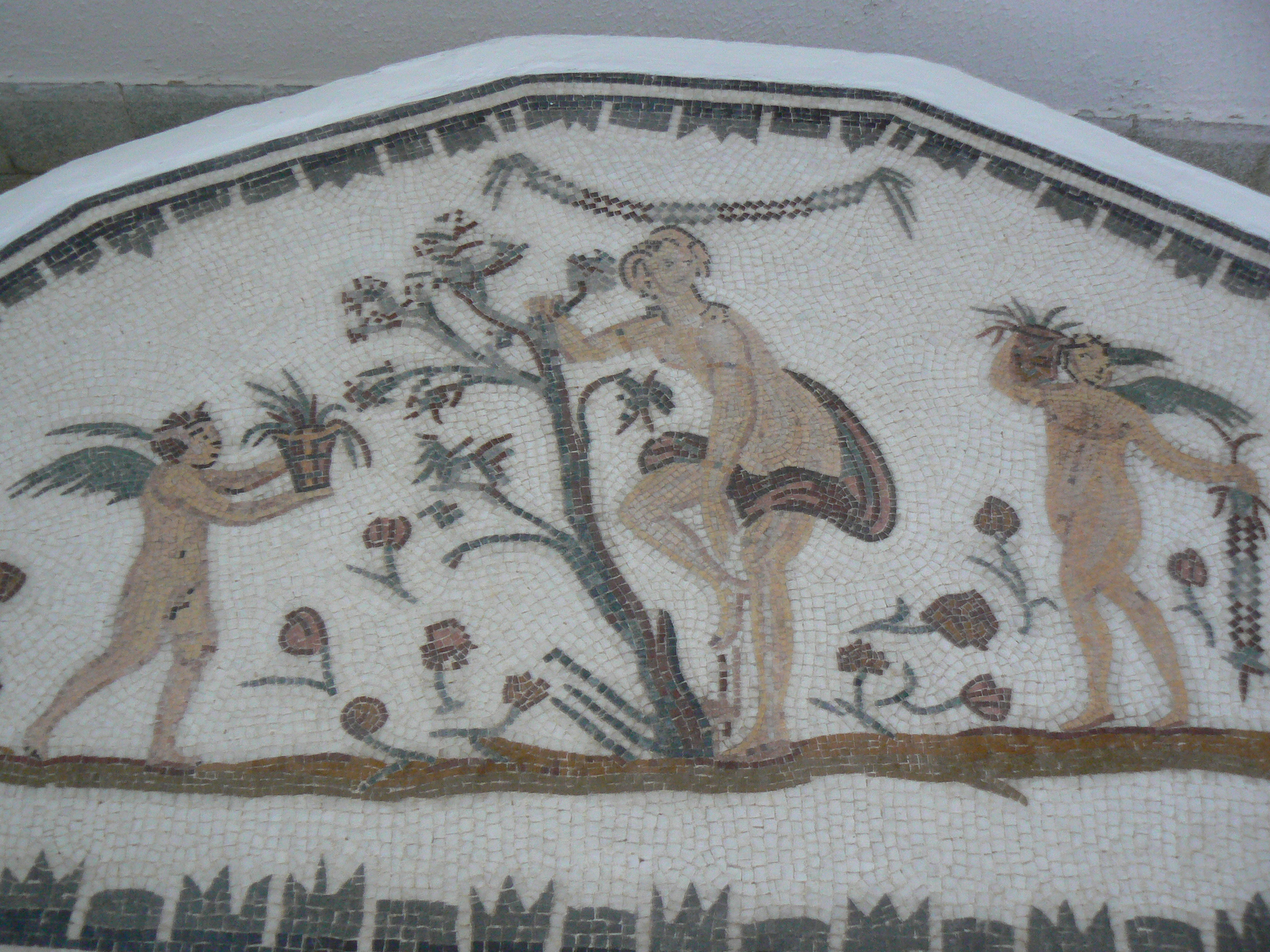 Venus au bain entourée de deux amours, Musée de Makthar, Tunisie